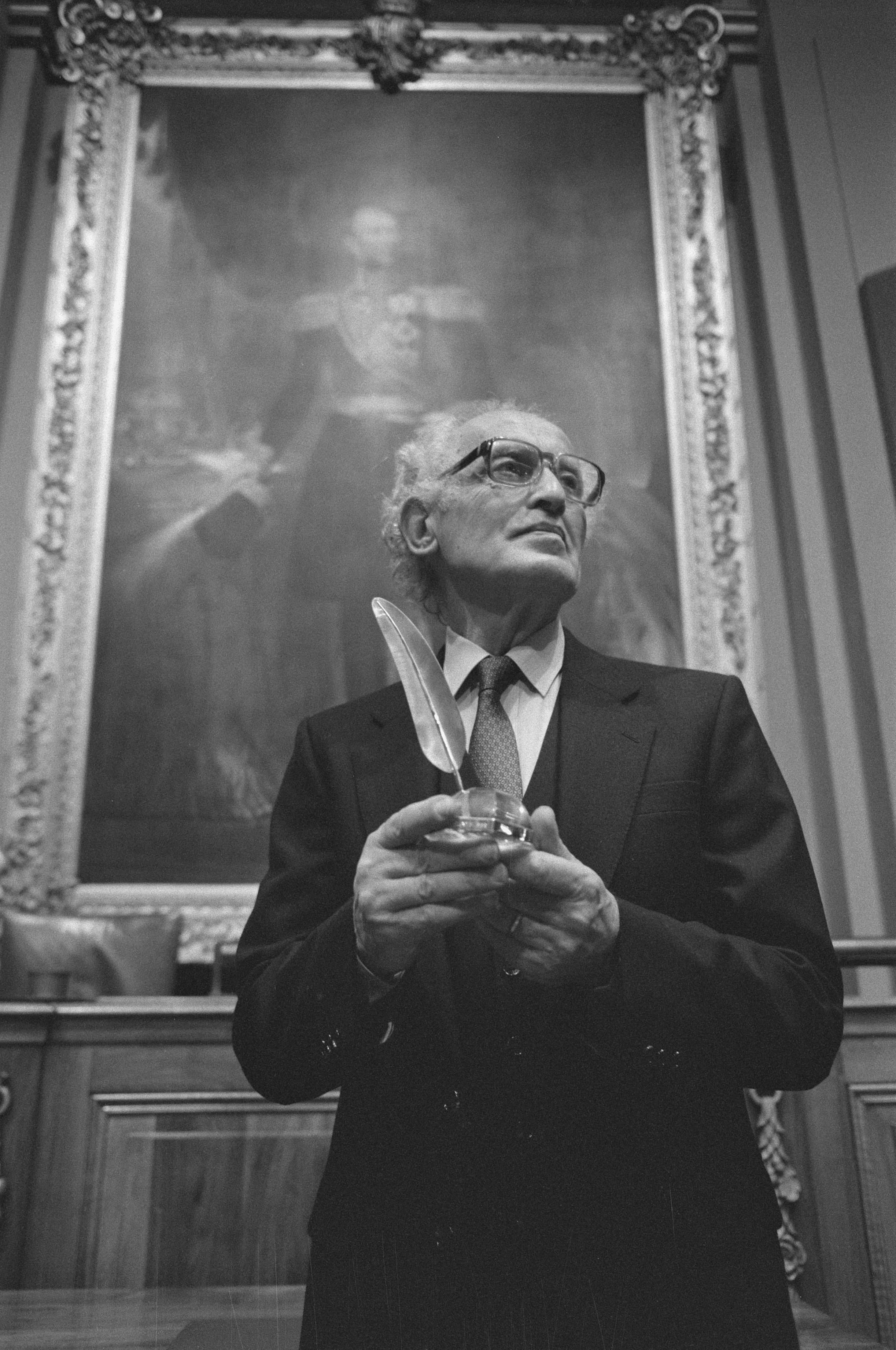 Collectie / Archief : Fotocollectie Anefo Reportage / Serie : [ onbekend ] Beschrijving : Gouden Ganzeveer uitgereikt aan dr. Lou de Jong Datum : 22 december 1988 Locatie : Den Haag, Zuid-Holland Trefwoorden : auteurs, prijzen, schrijvers Persoonsnaam : Jong, Lou de Instellingsnaam : Eerste Kamer Fotograaf : Croes, Rob C. / Anefo Auteursrechthebbende : Nationaal Archief Materiaalsoort : Negatief (zwart/wit) Nummer archiefinventaris : bekijk toegang 2.24.01.05 Bestanddeelnummer : 934-3785 Reacties Geplaatst door poezie op 21 mei 2015 - 17:13. culturele prijs van de Nederlandse Uitgeversbond (KNUB)